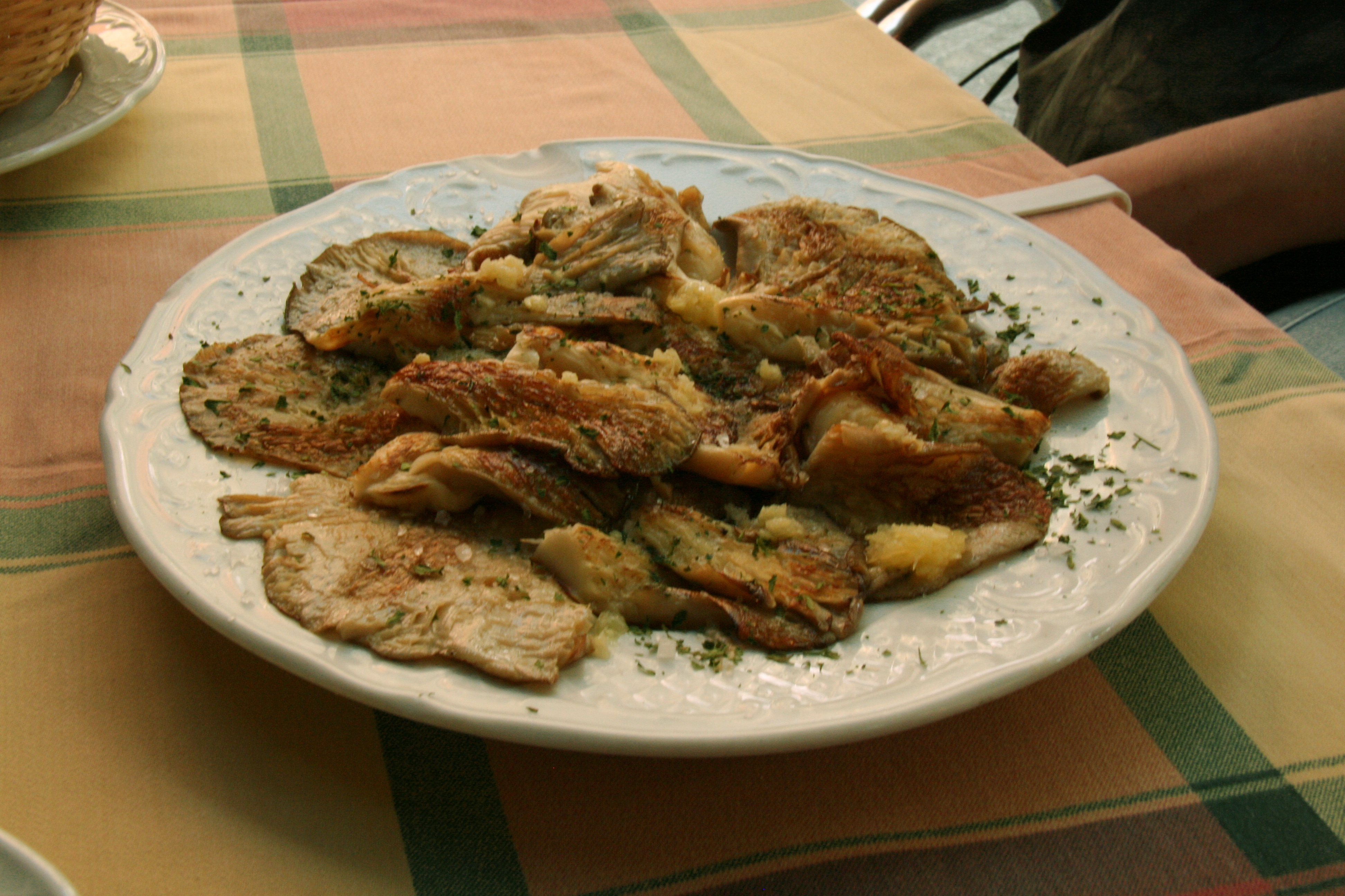 Setas de cardo - a a la Plancha